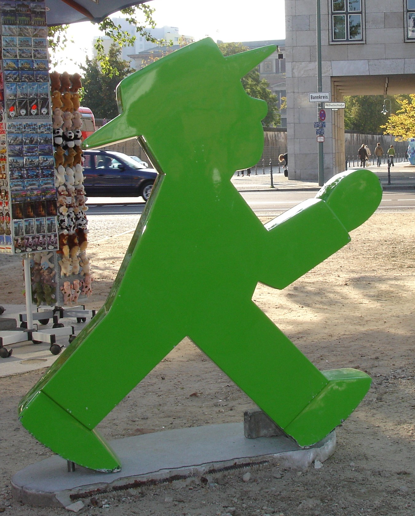 Ampelmann in Berlin